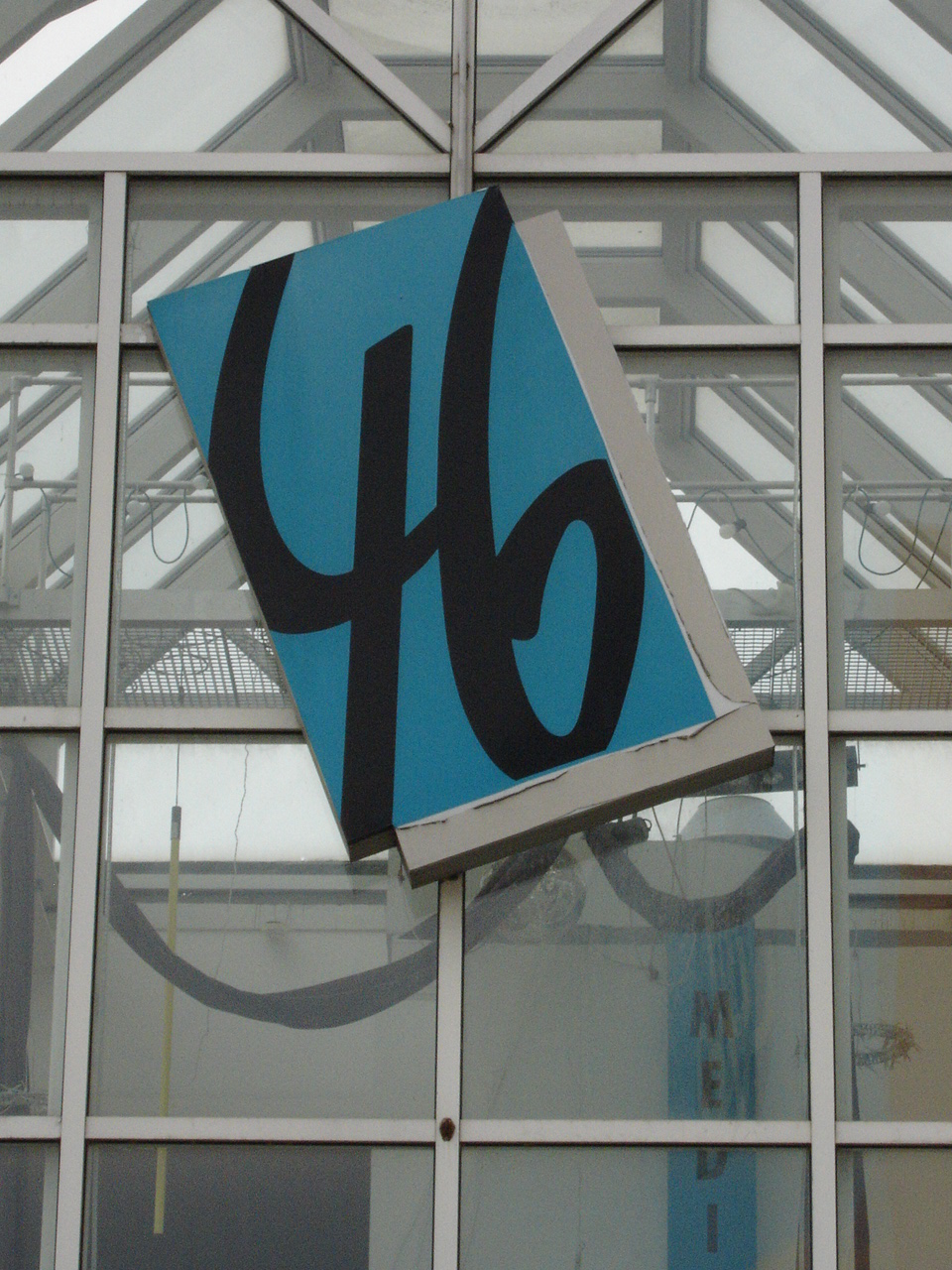 Eingangsbereich des früheren Standorts des Kommunalkino Bremen (als "Kino 46") mit damaligem Logo